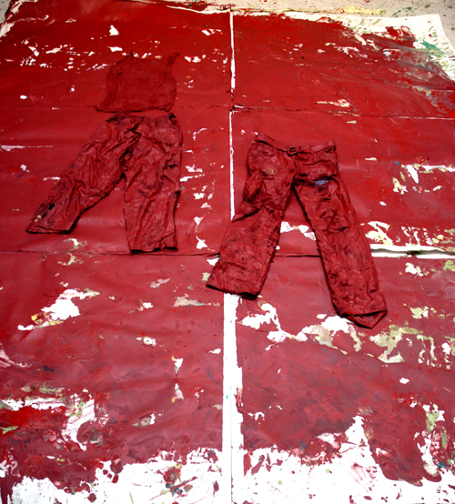 Relikte der Performance "Extra-territorialité" realisiert 2007 im Atelier in Montreuil gemeinsam mit Jonathan Abbou